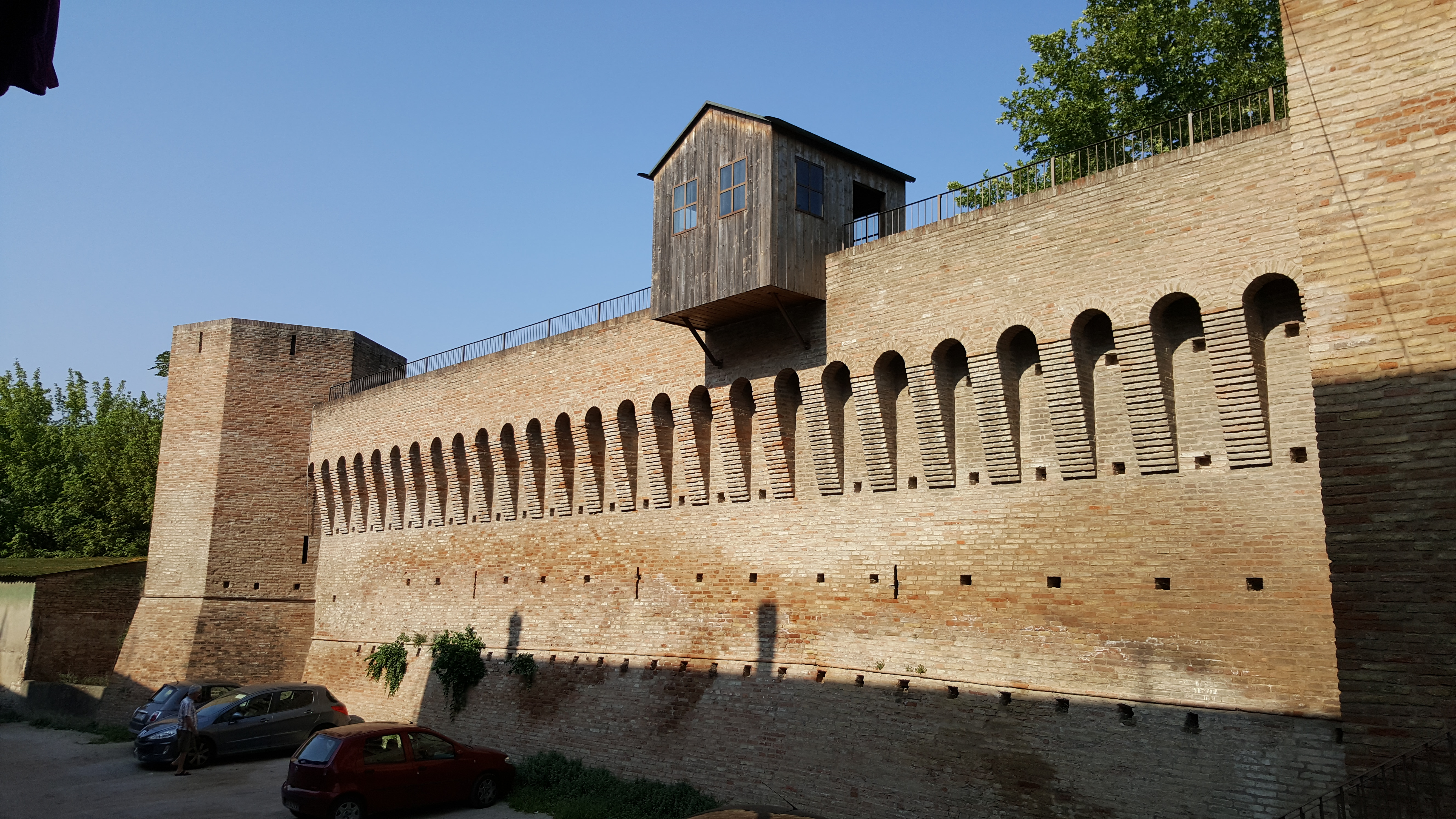 Beccatelli di sinistra This is a photo of a monument which is part of cultural heritage of Italy.